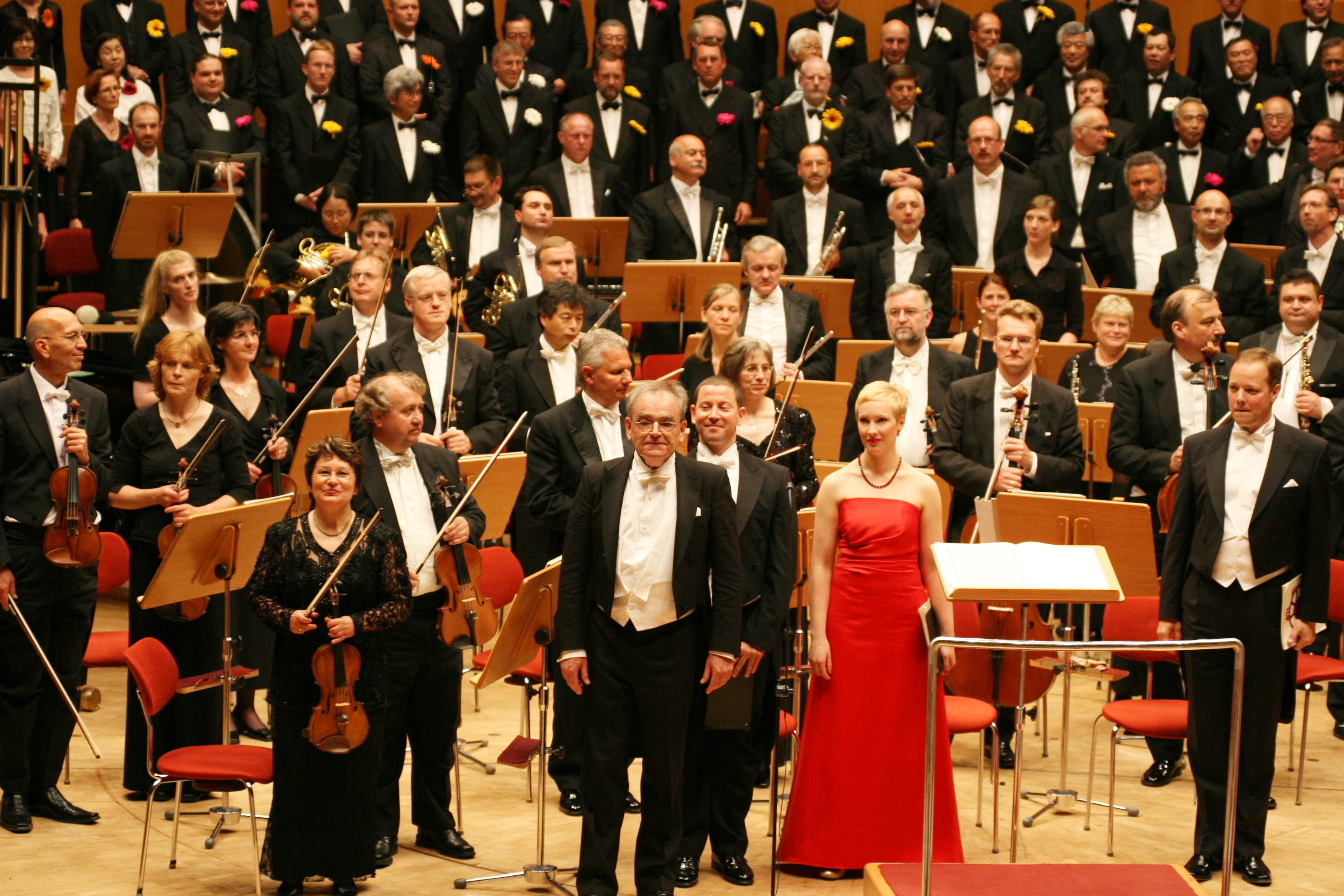 Prof. Horst Meinardus im Anschluss an das Konzert mit der Tokyo Oratorio Society, dem Philharmonischen Orchester Vorpommern und dem Philharmonischen Chor Köln am 31. Mai 2008 in der Kölner Philharmonie